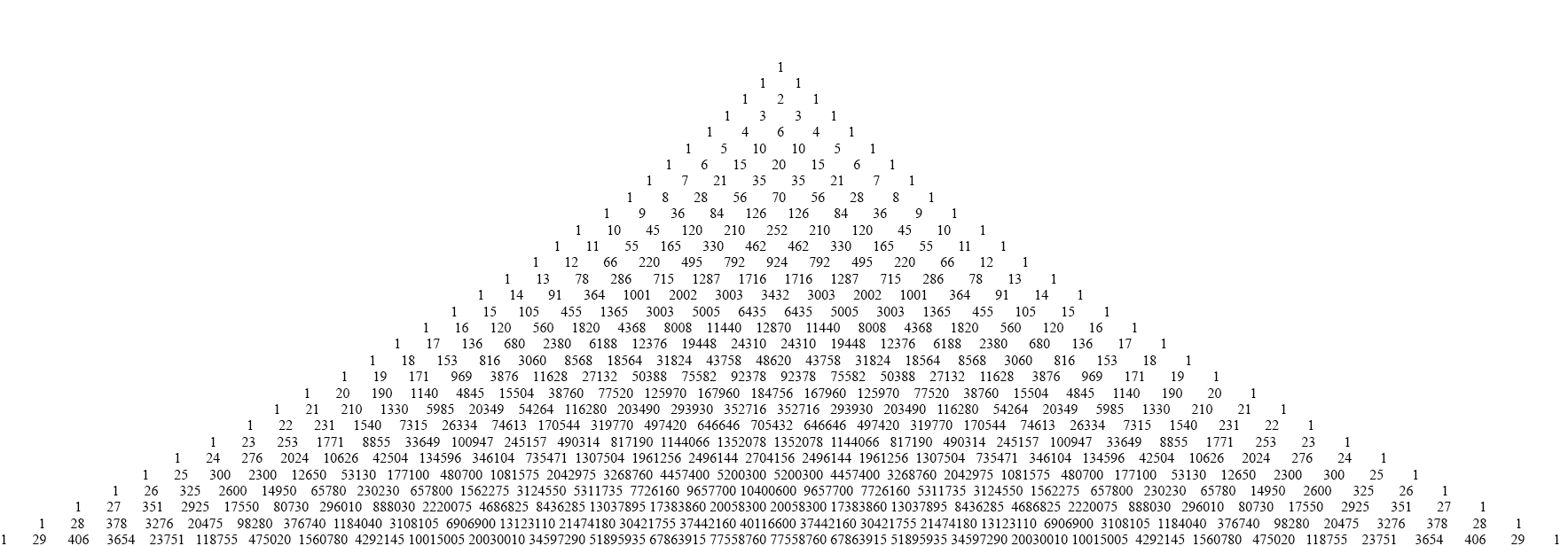 Pascal's Triangle